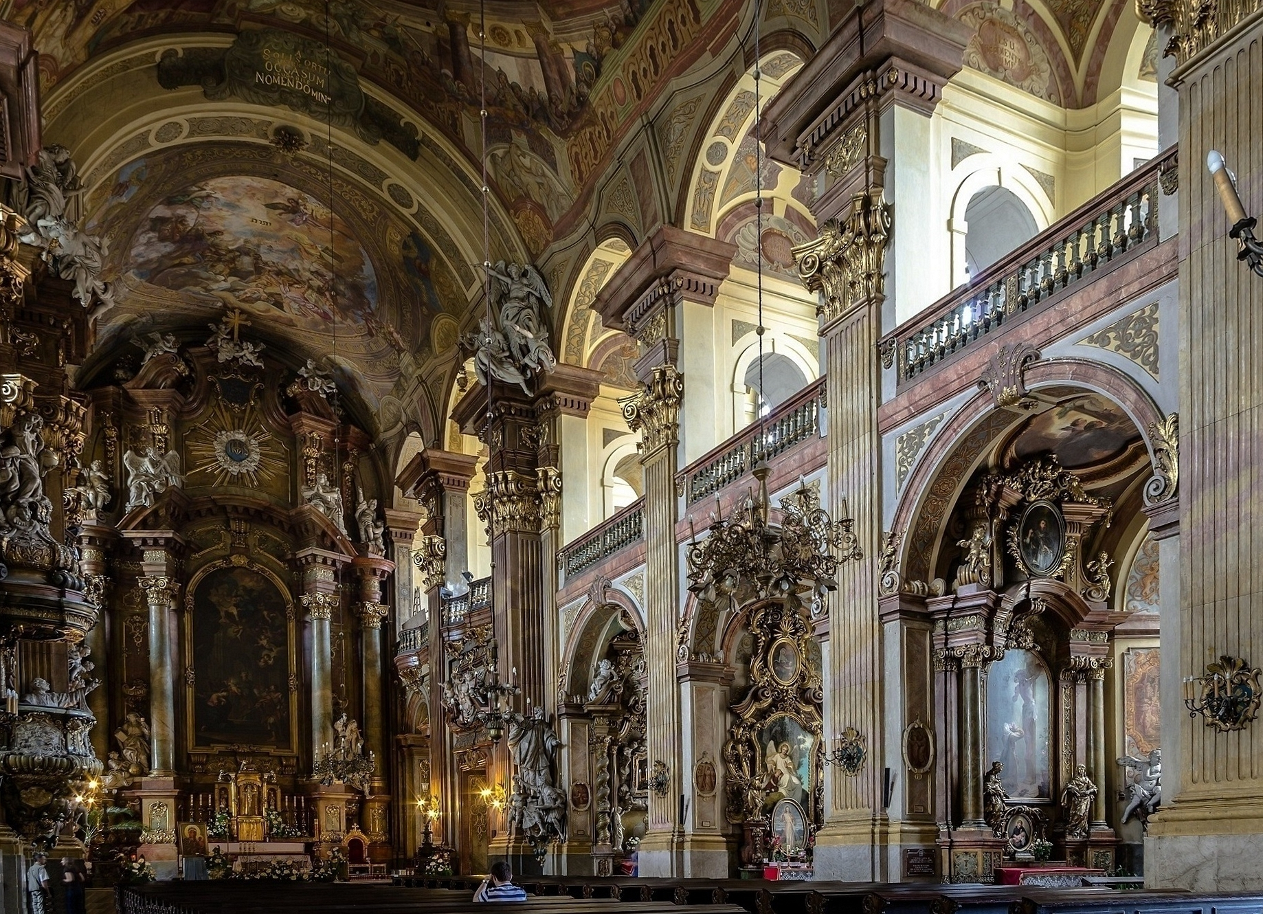 Kościół parafialny Najświętszego Imienia Jezus (Uniwersytecki) oo. jezuitów - wnętrze